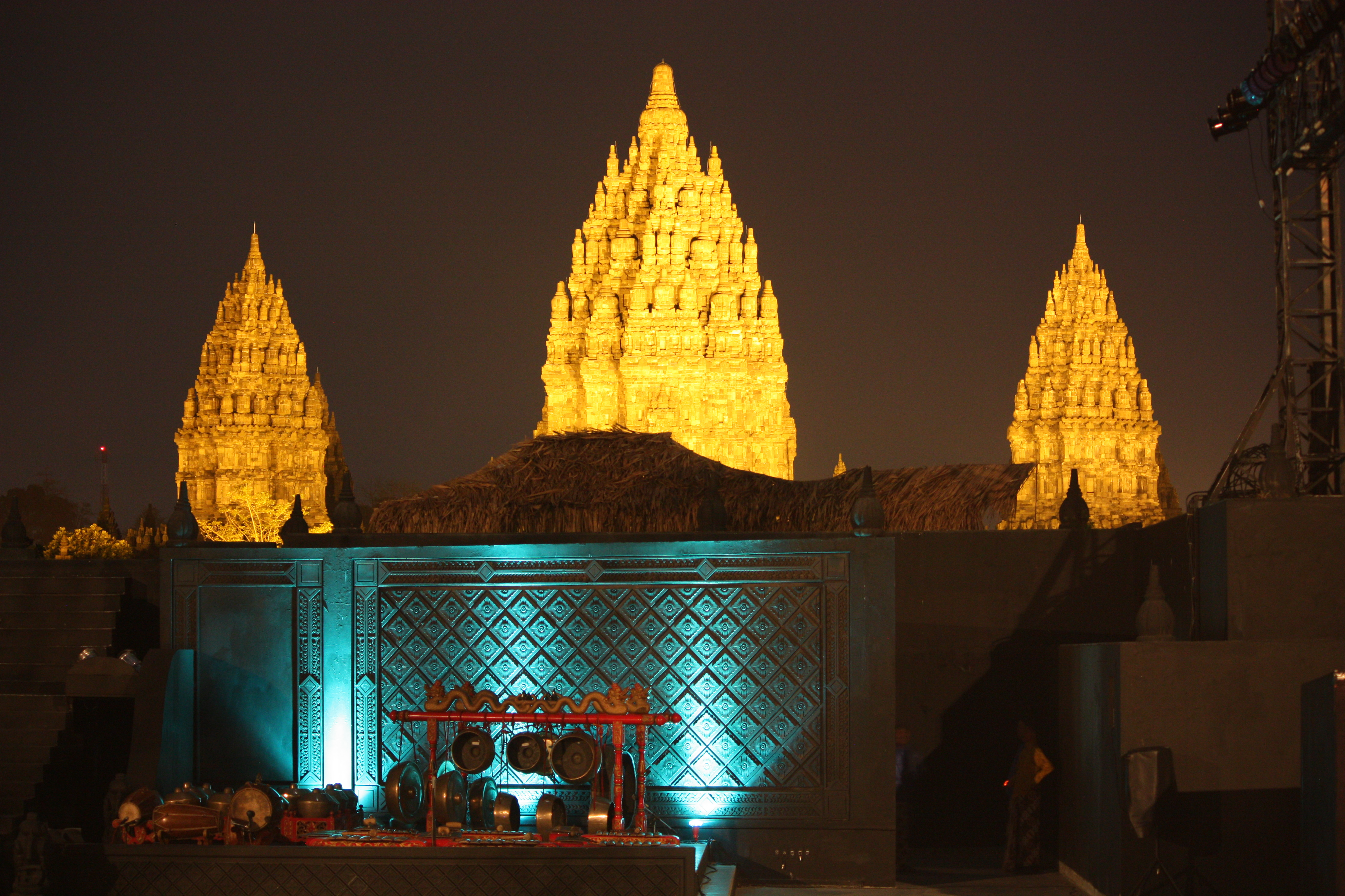 Prambanan Ramayana ballet, decor